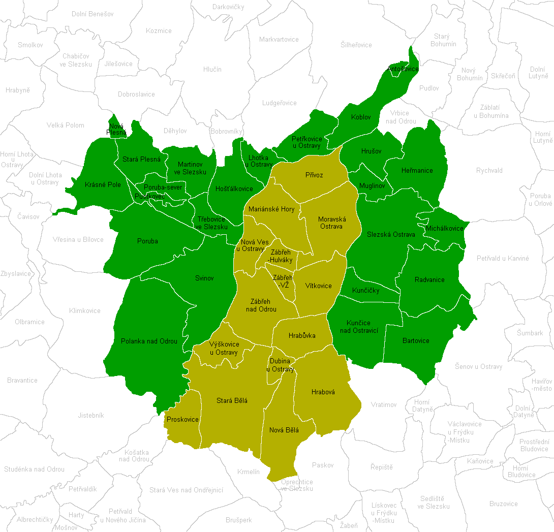 Cadastral map of Ostrava 00 Moravia 00 Czech Silesia